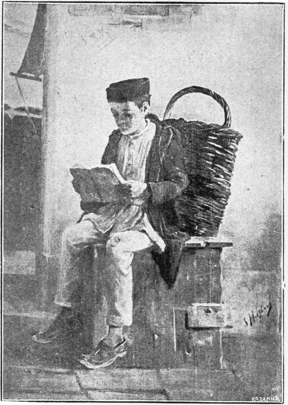 "Brotträgerjunge" - Werk des griechischen Malers Spyridon Mantzakos, 19., u. Anfang 20. Jahrhundert